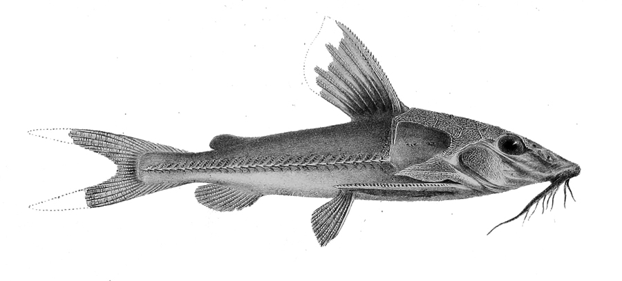 Opsodoras stuebelii